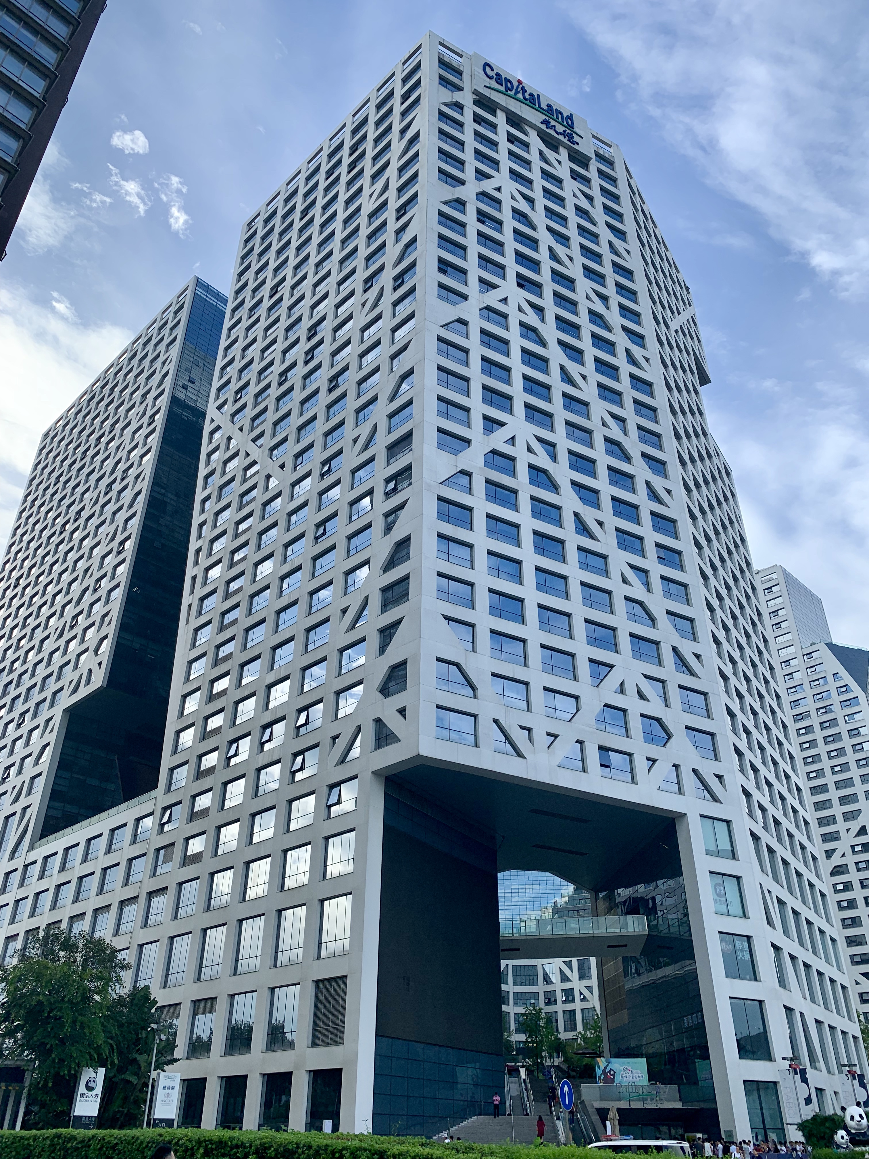 凯德成都来福士外观